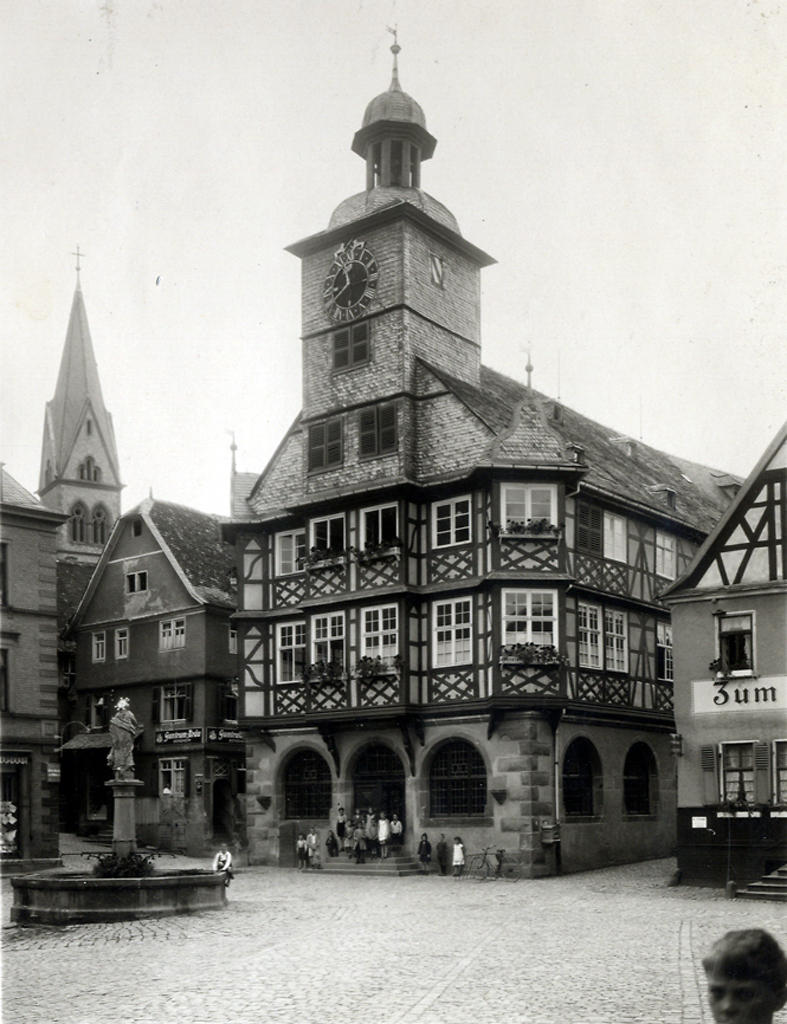 Heppenheimer Rathaus am Markplatz, um 1900